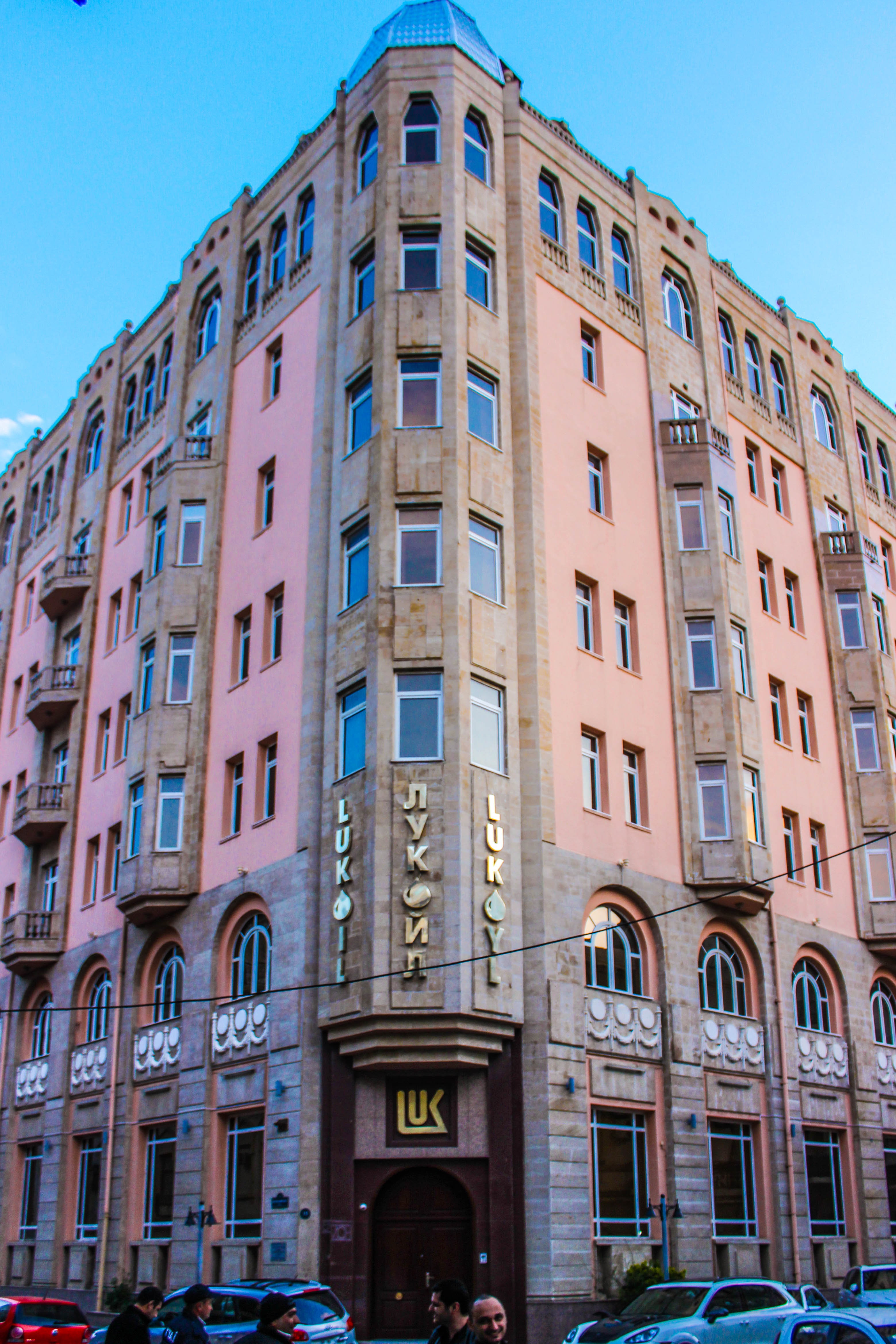 Yeni Avropa otelinin binası, memar Ploşko